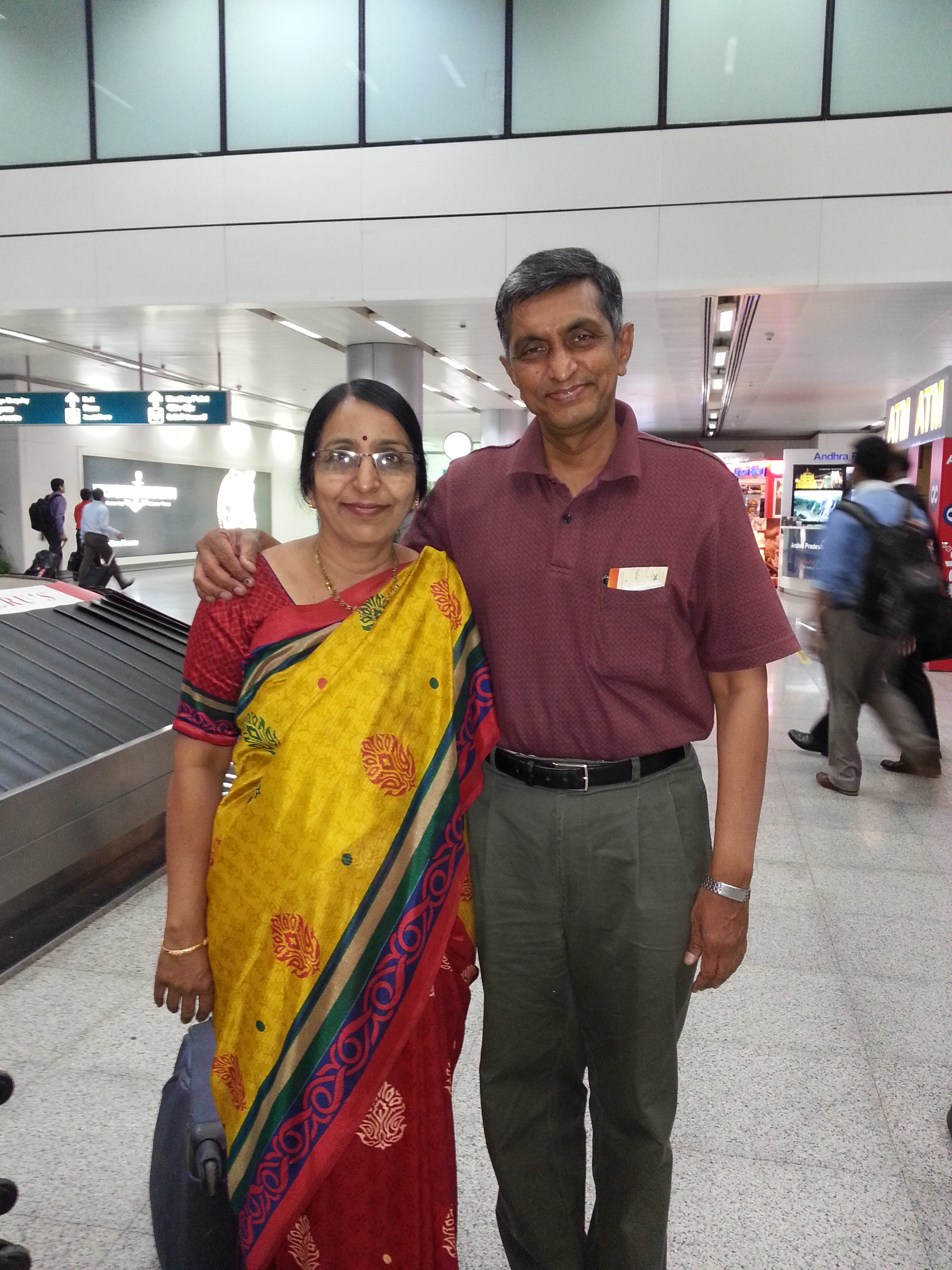 Jayaprakash Narayan & Spouse